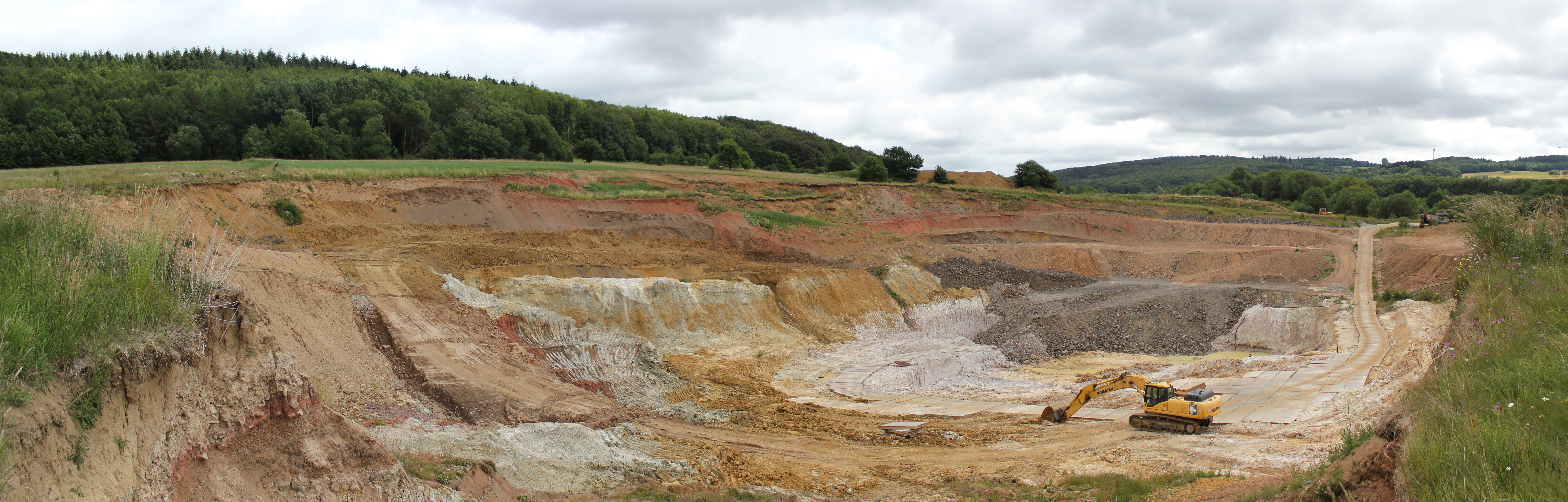 Tonabbau in Guckheim, Westerwald